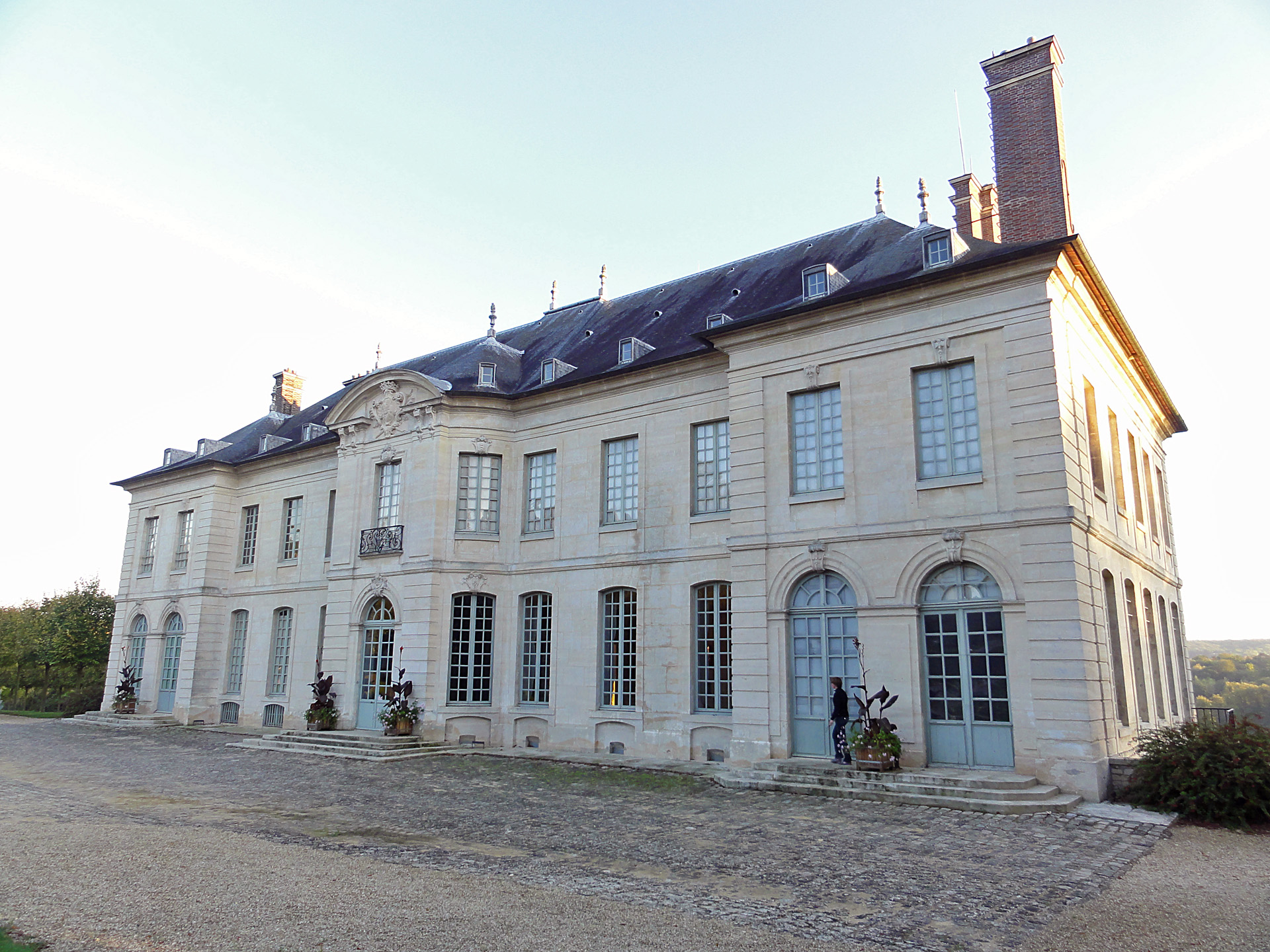 Façade nord du château du Haut. Domaine de Villarceaux, Chaussy, Val-d'Oise, France.